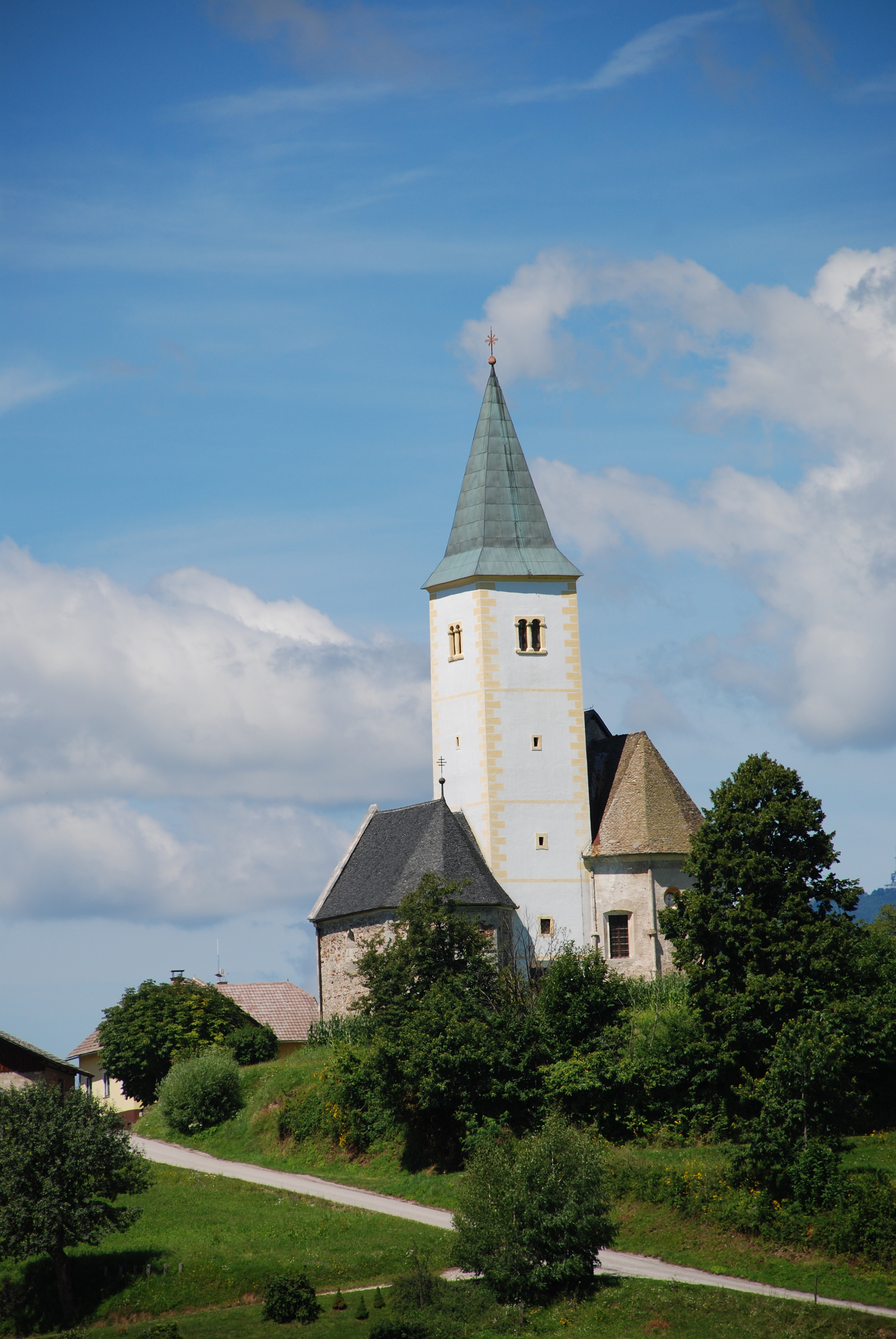 Podružnična cerkev na Brunku nad Radečami.